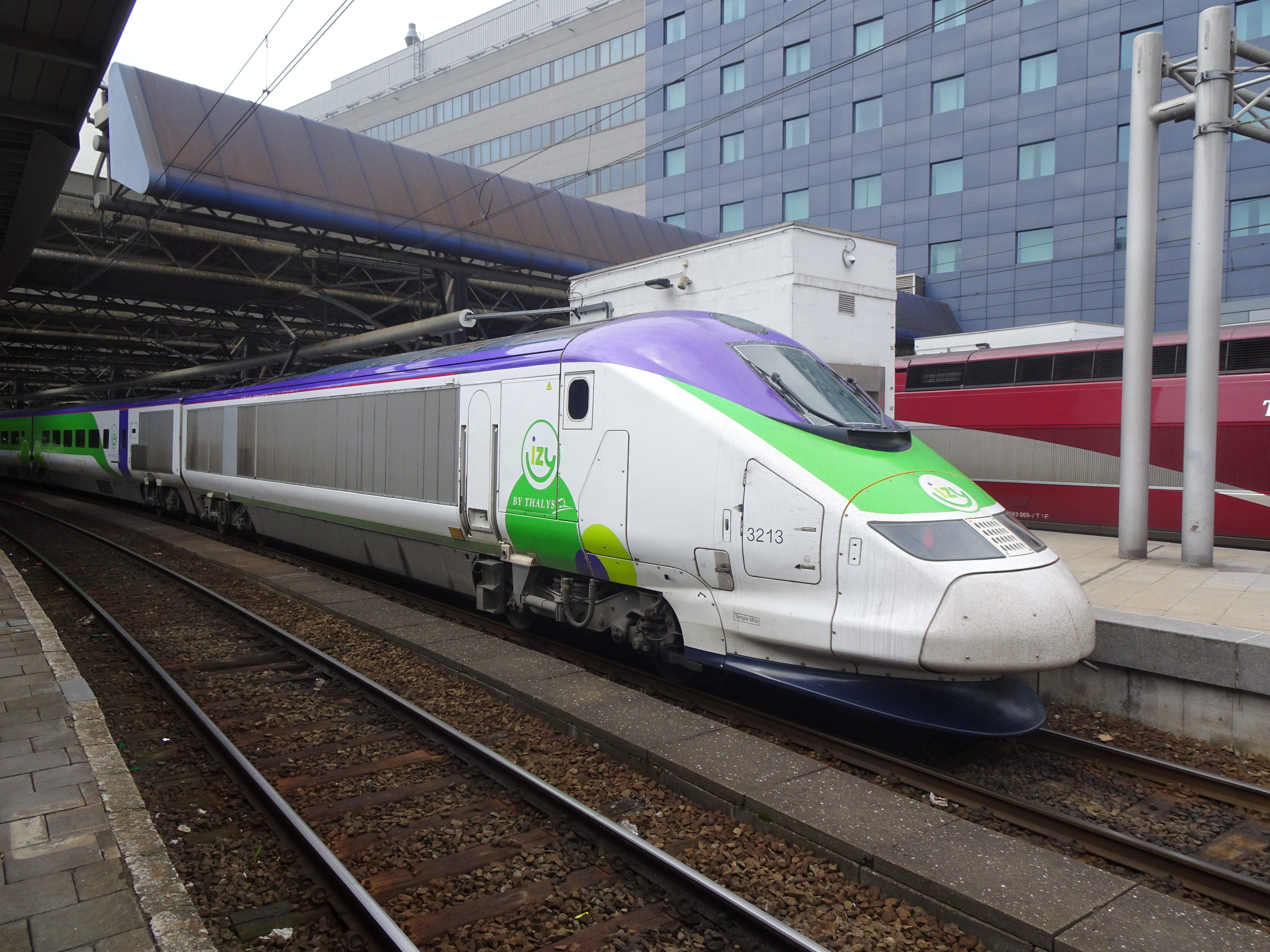 TGV TMST (ex-Eurostar) 3213/3224 exploité par Izy attendant le départ en gare de Bruxelles-Midi.